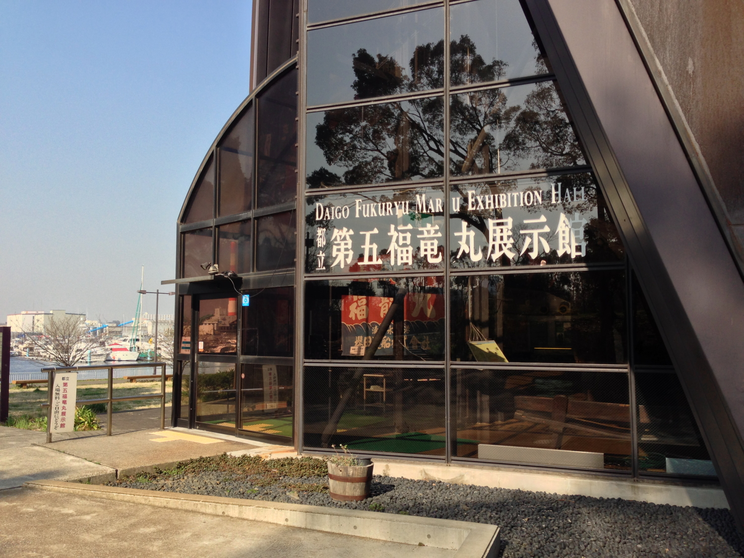 第五福竜丸展示館の入口